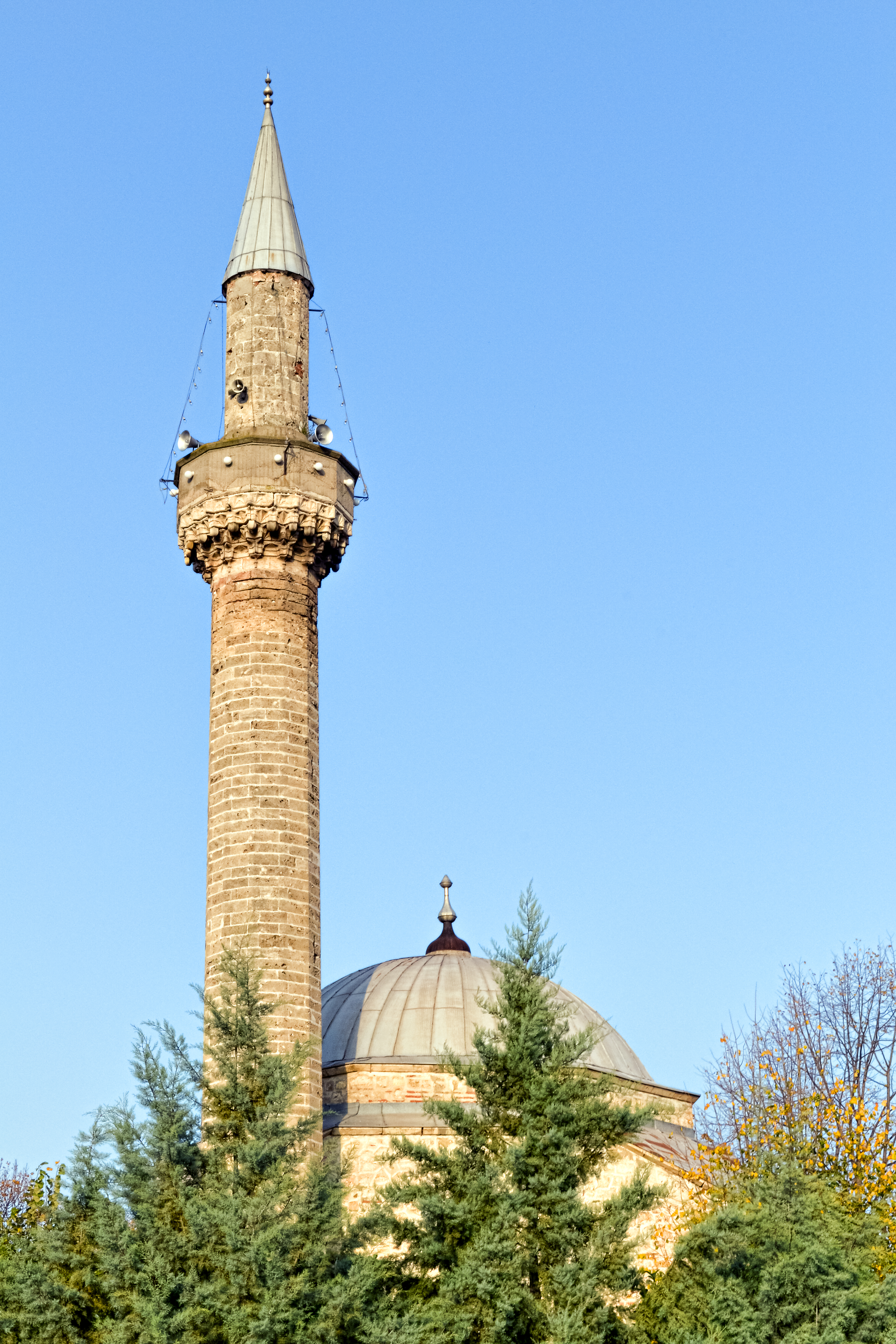 Хусеин Шах -џамија во Сарај